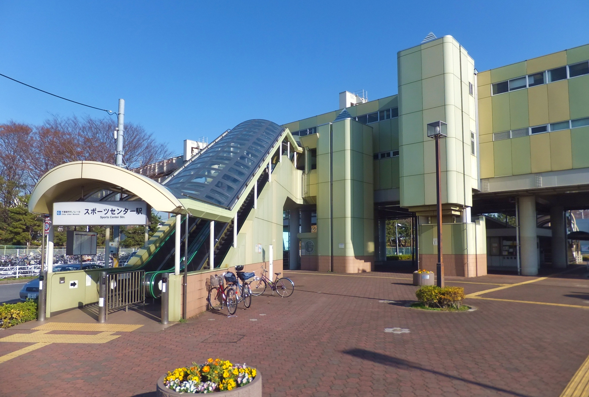 千葉都市モノレールスポーツセンター駅エントランス